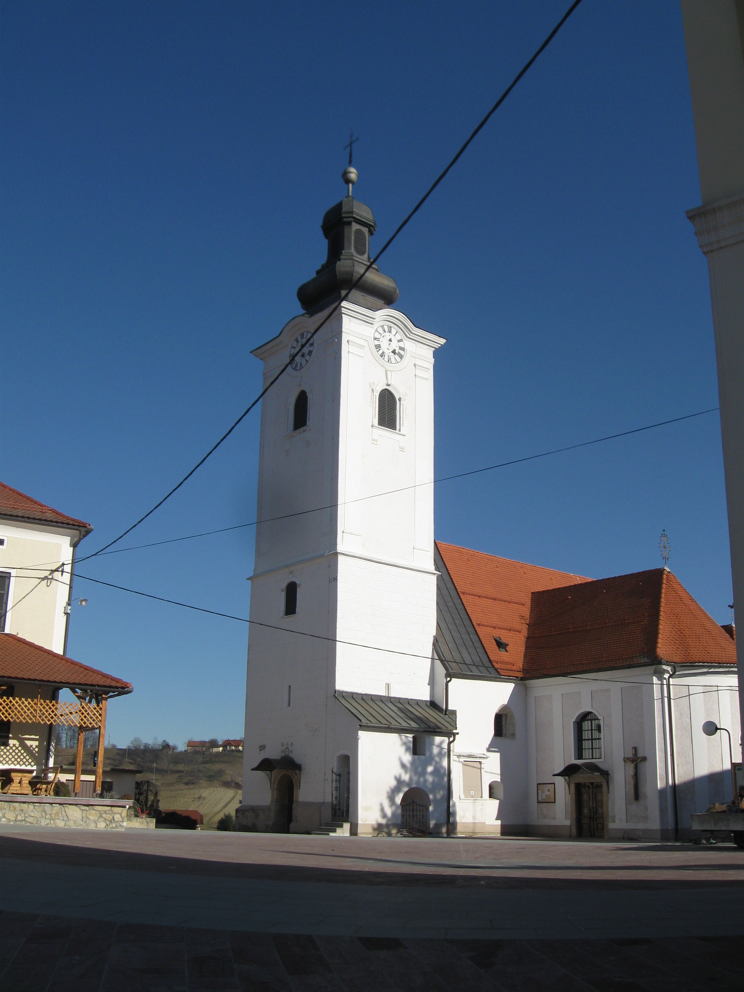 Cerkev Svetega Jurija v Jurovskem Dolu v Slovenskih goricah.